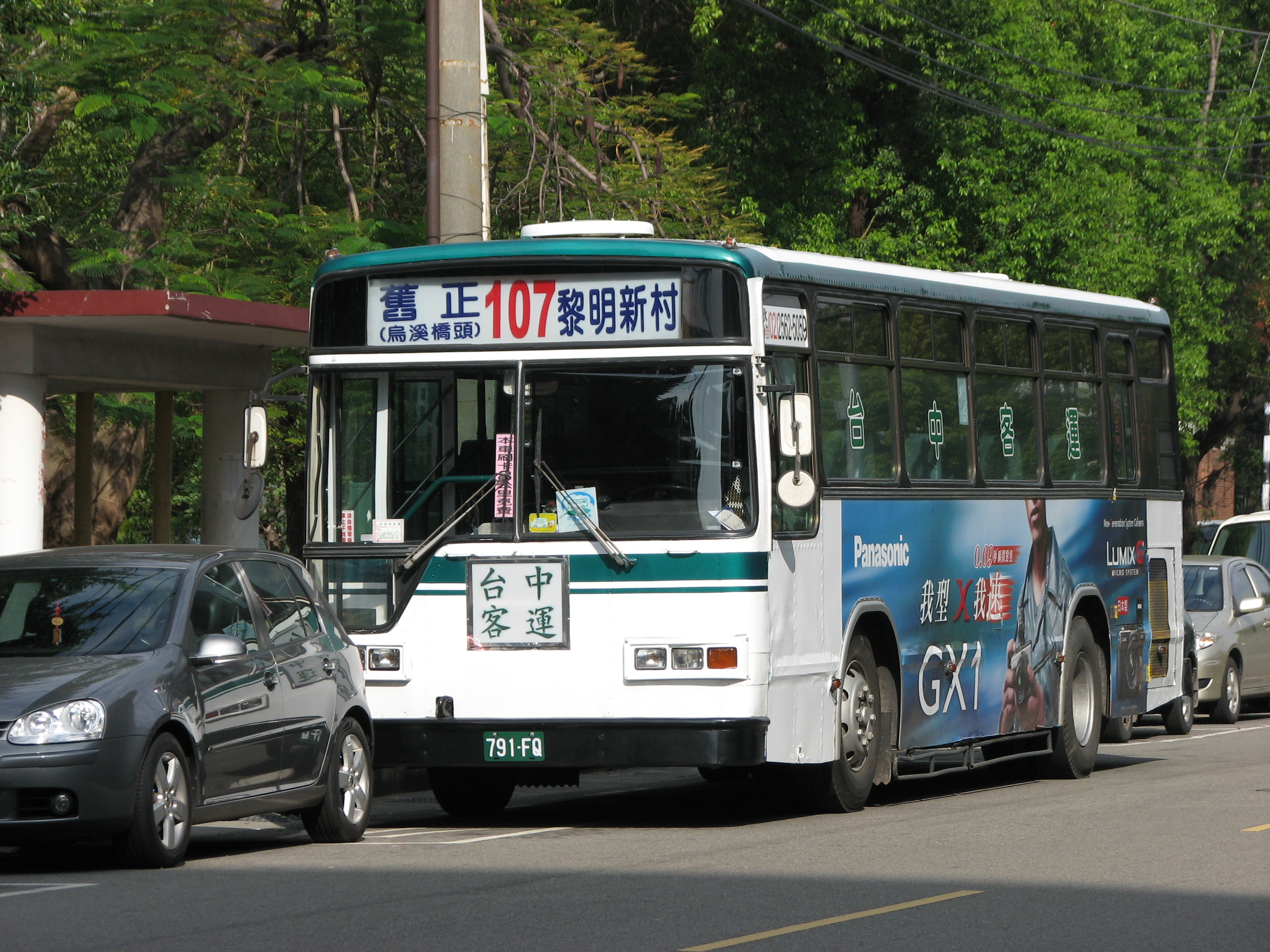 台中客運日野ERK2JMM大客車791-FQ行駛台中市公車107路，起站為黎明新村。車身左側貼Panasonic Lumix數位相機DMC-GX1廣告。